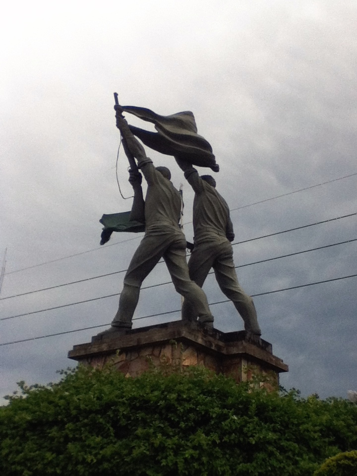 Monumento Roca y Coronado, Santa Cruz de la Sierra